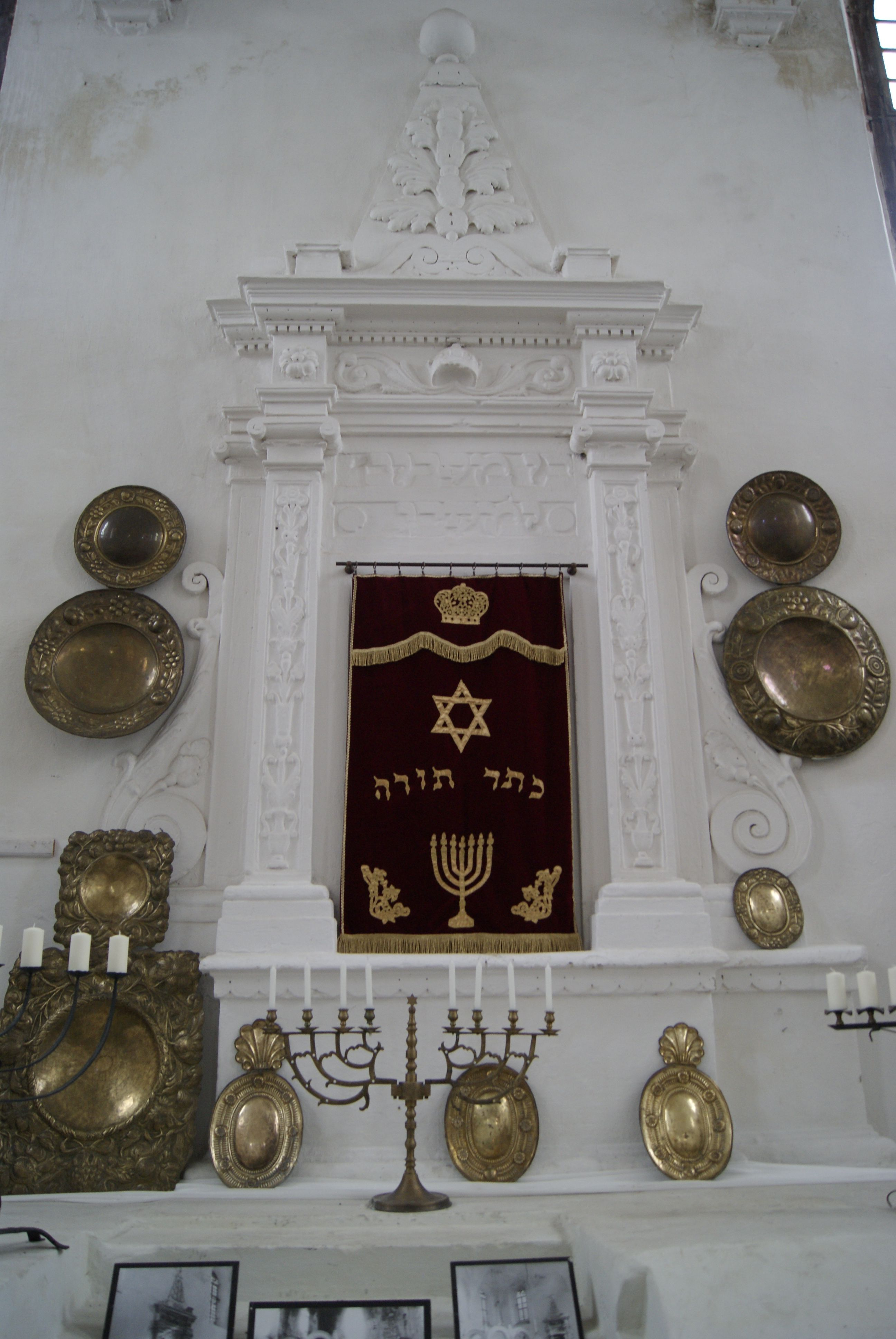 Szydłów - synagoga, obecnie dom kultury, pocz. XVI, XVII w., lata 1970-1980